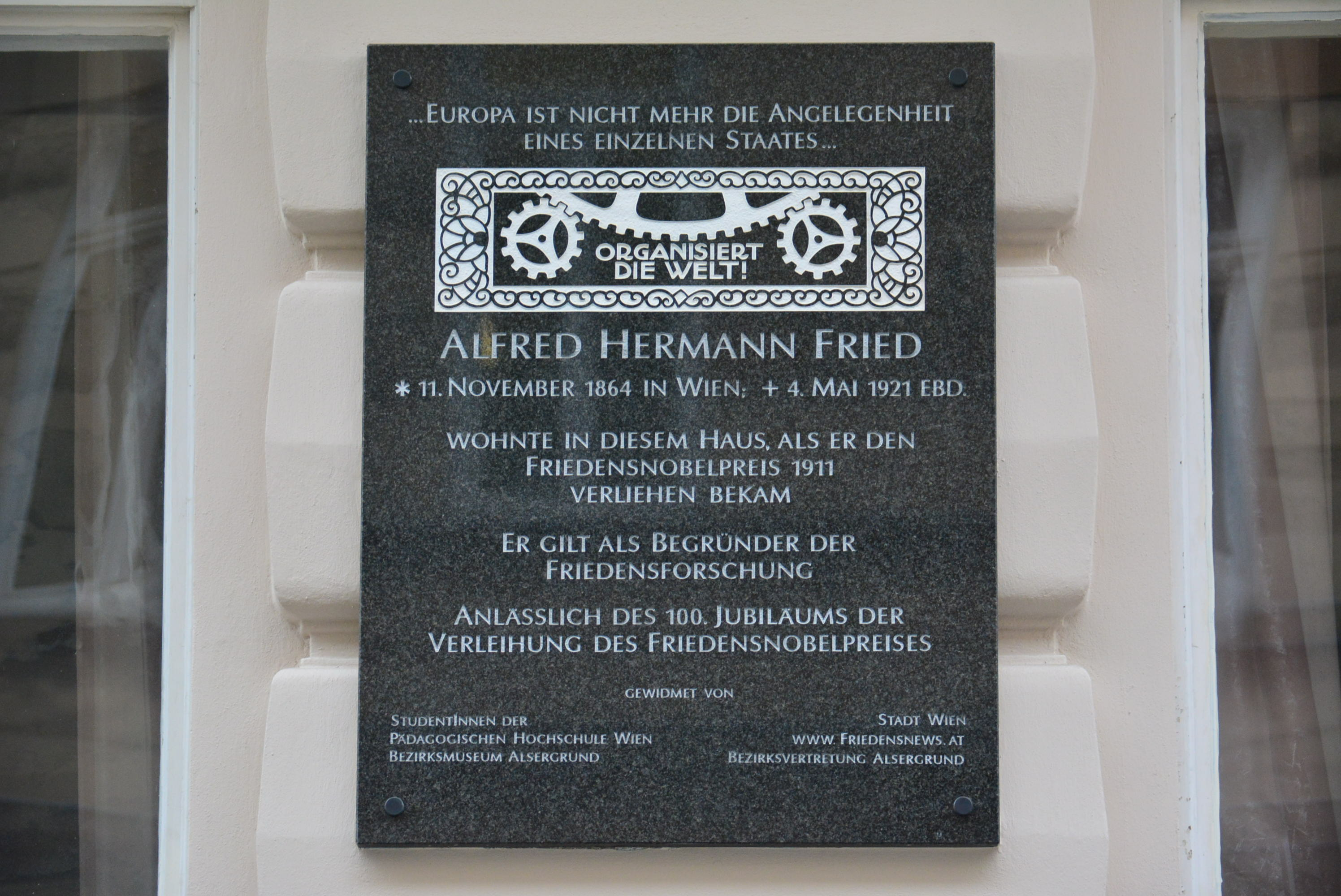 Gedenktafel für Alfred Hermann Fried (Wien, Widerhofergasse 5)